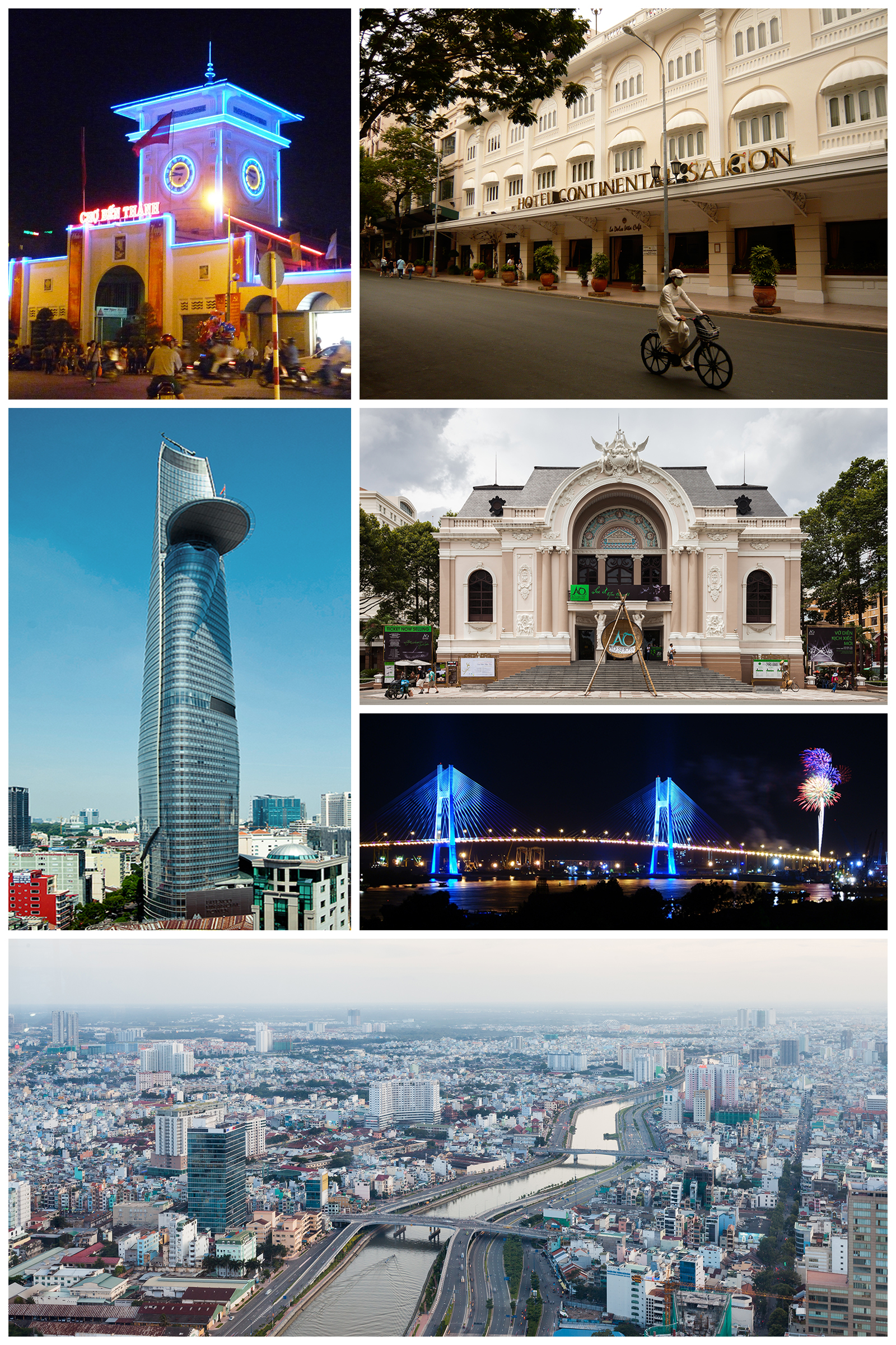 A collage of photos depicting several Ho Chi Minh City buildings and sceneries.